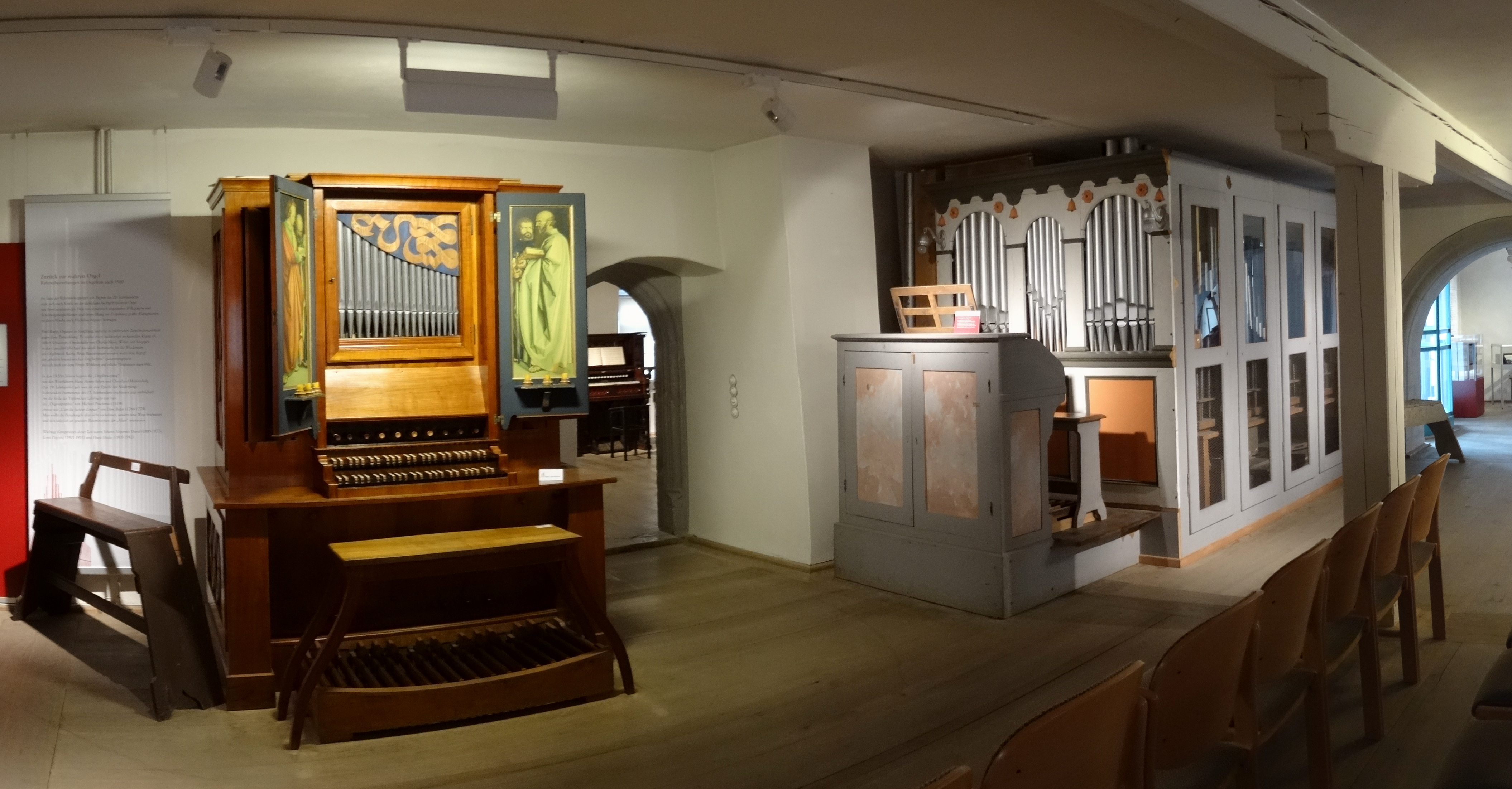 Im Orgelmuseum Schloss Hanstein, Ostheim vor der Rhön